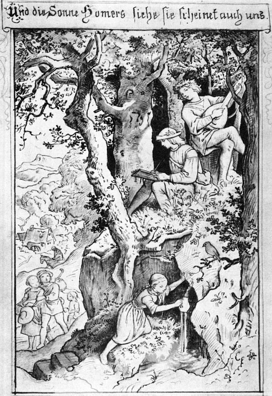 Illustration zu Friedrich Schillers gedicht Der Spaziergang: Und die Sonne Homers, siehe! sie lächelt auch uns.